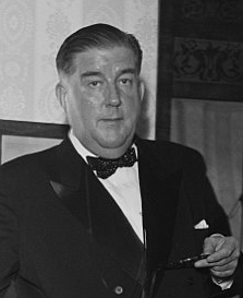 Bildet er hentet fra Arkivverket. Troll i ord fra Skeikampen Arkivinstitusjon : Riksarkivet Arkivnavn : Billedbladet NÅ Sted : Norge, Oppland, Gausdal, Skeikampen Emneord: Filminnspilling, Skuespillere Avbildet: Schønberg, Ib;Strand, Ragge